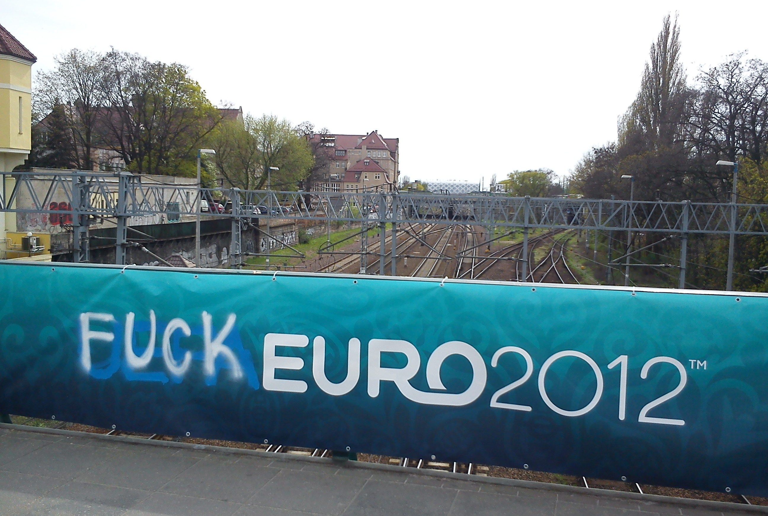 Most Teatralny, Poznań. IV 2012r.